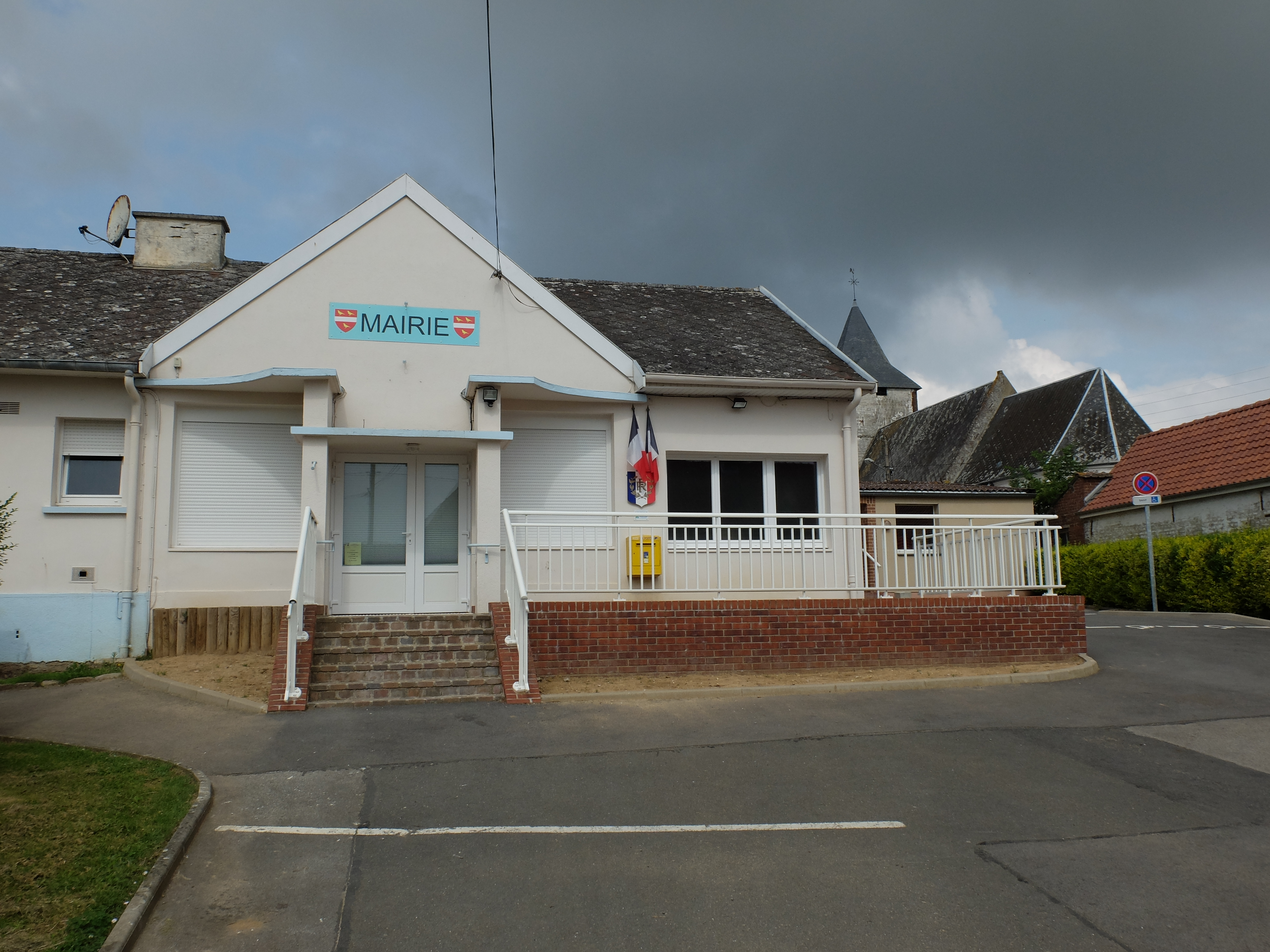 Vue de la mairie et de l'église Saint-Pierre de Bailleul-aux-Cornailles.